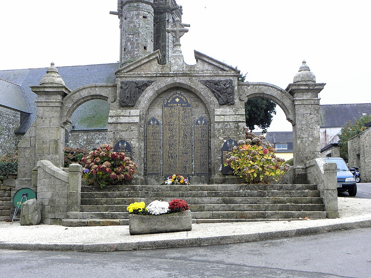 Le monument aux morts de Plogonnec (29), édifié en 1921 par l'architecte Charles Chaussepied.